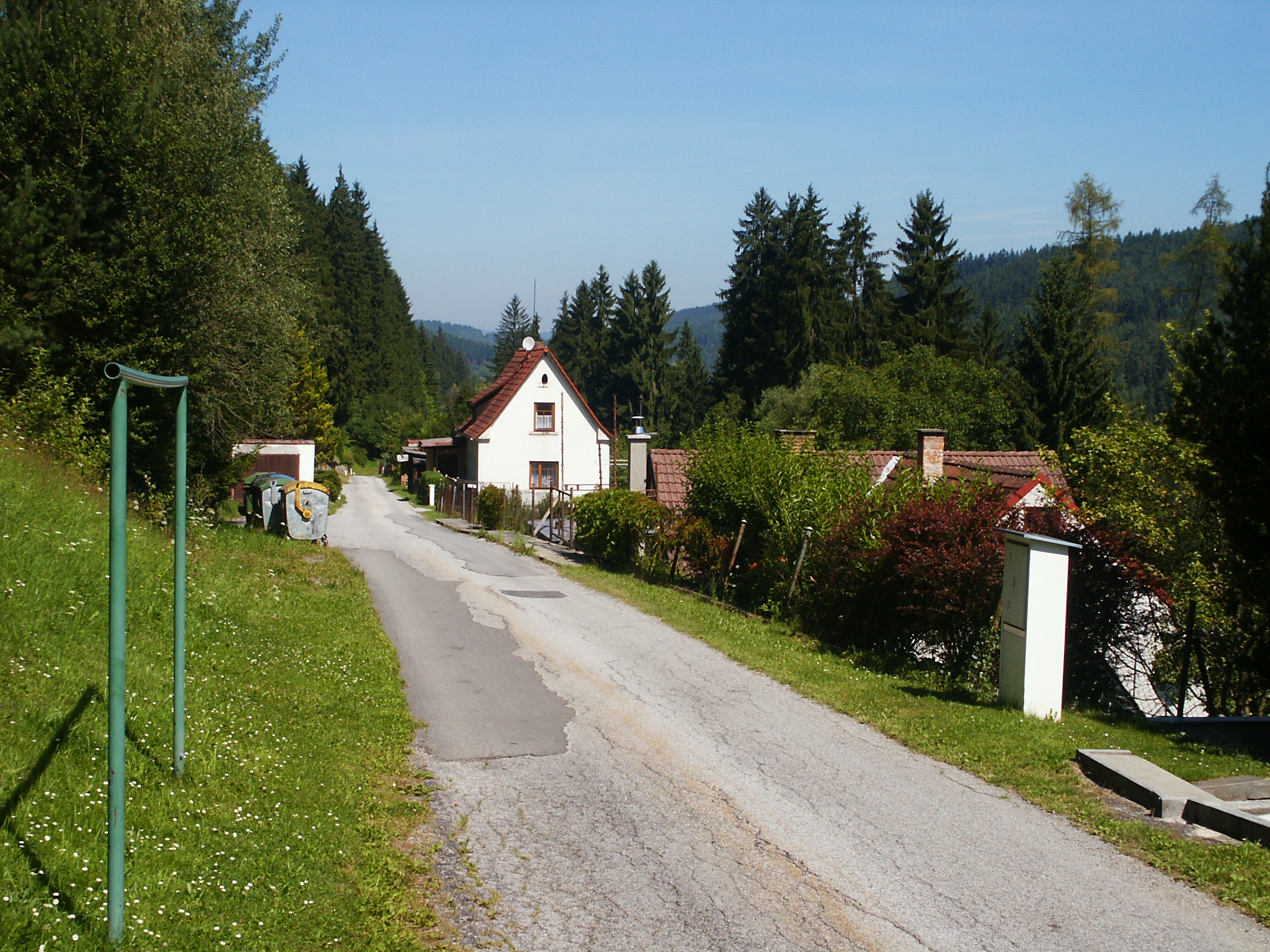 Dobrné - střed obce